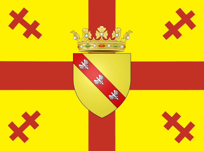 Il est nommé également étendard Charles IV, car il fut créé par ce dernier lors de la guerre de Trente ans au 17e siècle, afin d’unifier le peuple lorrain contre l’envahisseur français. On retrouve ici le blason de la maison Lorraine surmonté de la couronne ducale. On y retrouve également les croix de Lorraine, ainsi qu'une croix catholique rappelant les convictions de la Lorraine lors de ces périodes de trouble entre protestants et catholiques.